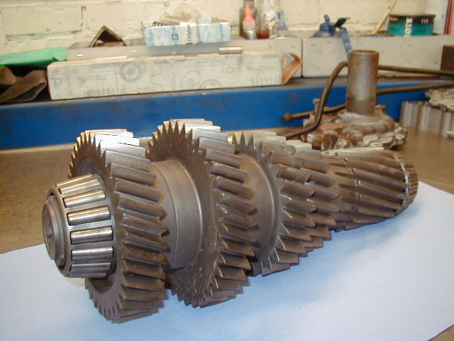 De hulpas van een 16-gangen versnellingsbak.